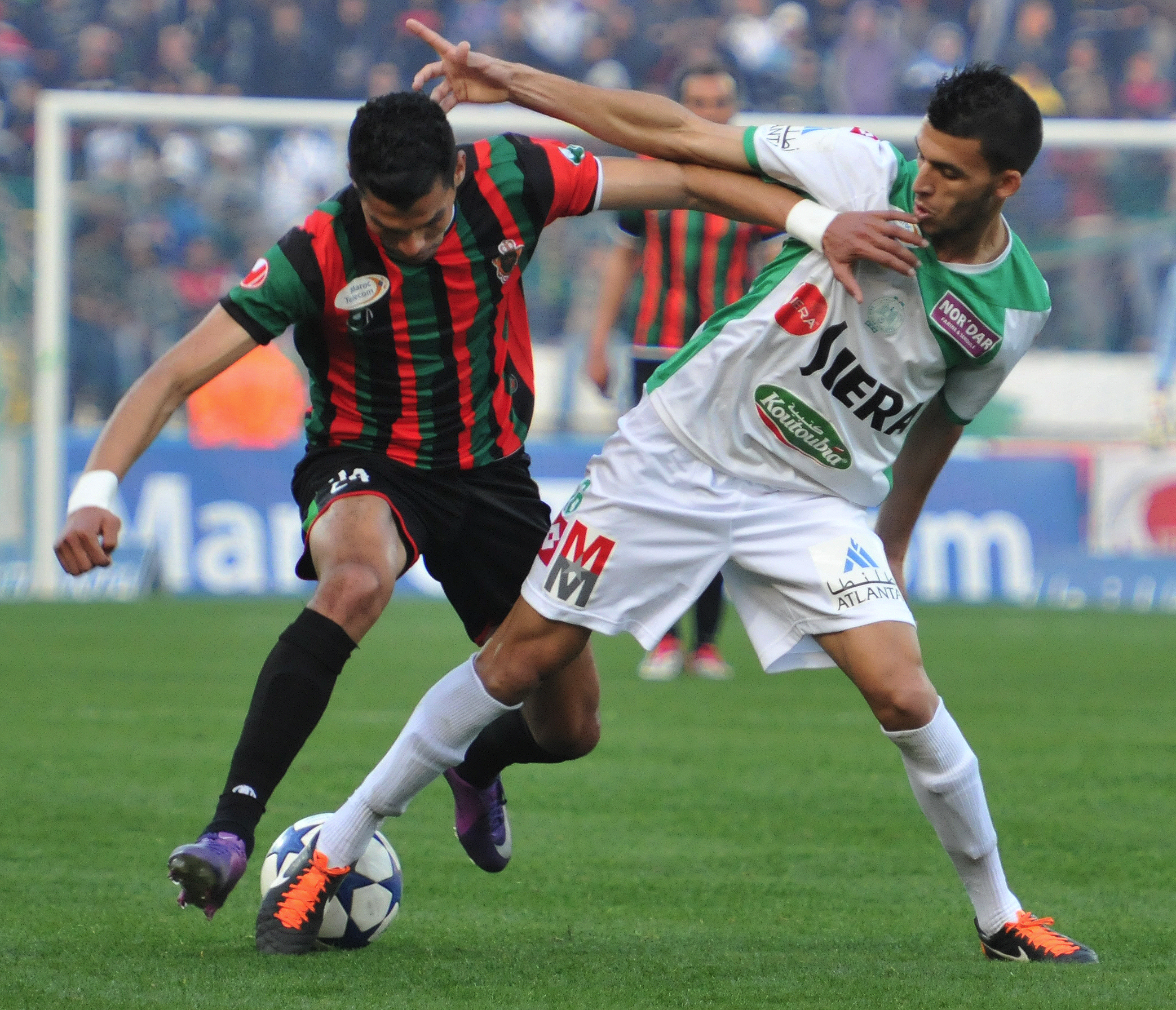 RCA vs FAR